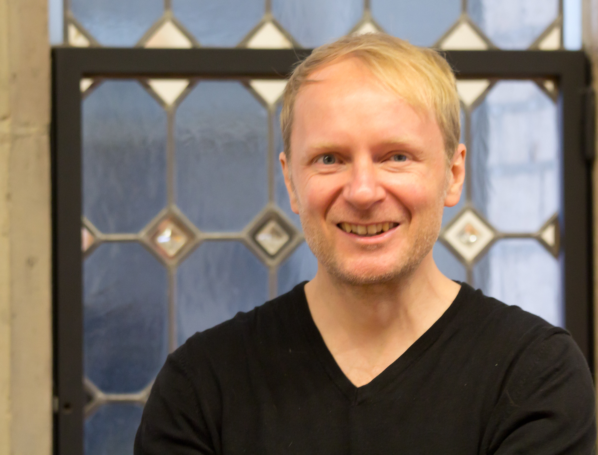 Jochen Schmidt, deutscher Autor, beim Empfang im Rathaus Köln anlässlich des Programms „Ein Buch für die Stadt“ bzw. seinem Eintrag ins Gästebuch der Stadt.